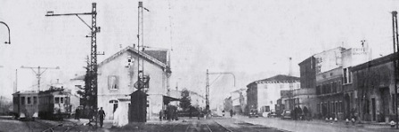 Strà di Caldiero, diramazione delle tranvie per San Bonifacio e per Tregnago dopo l'elettrificazione